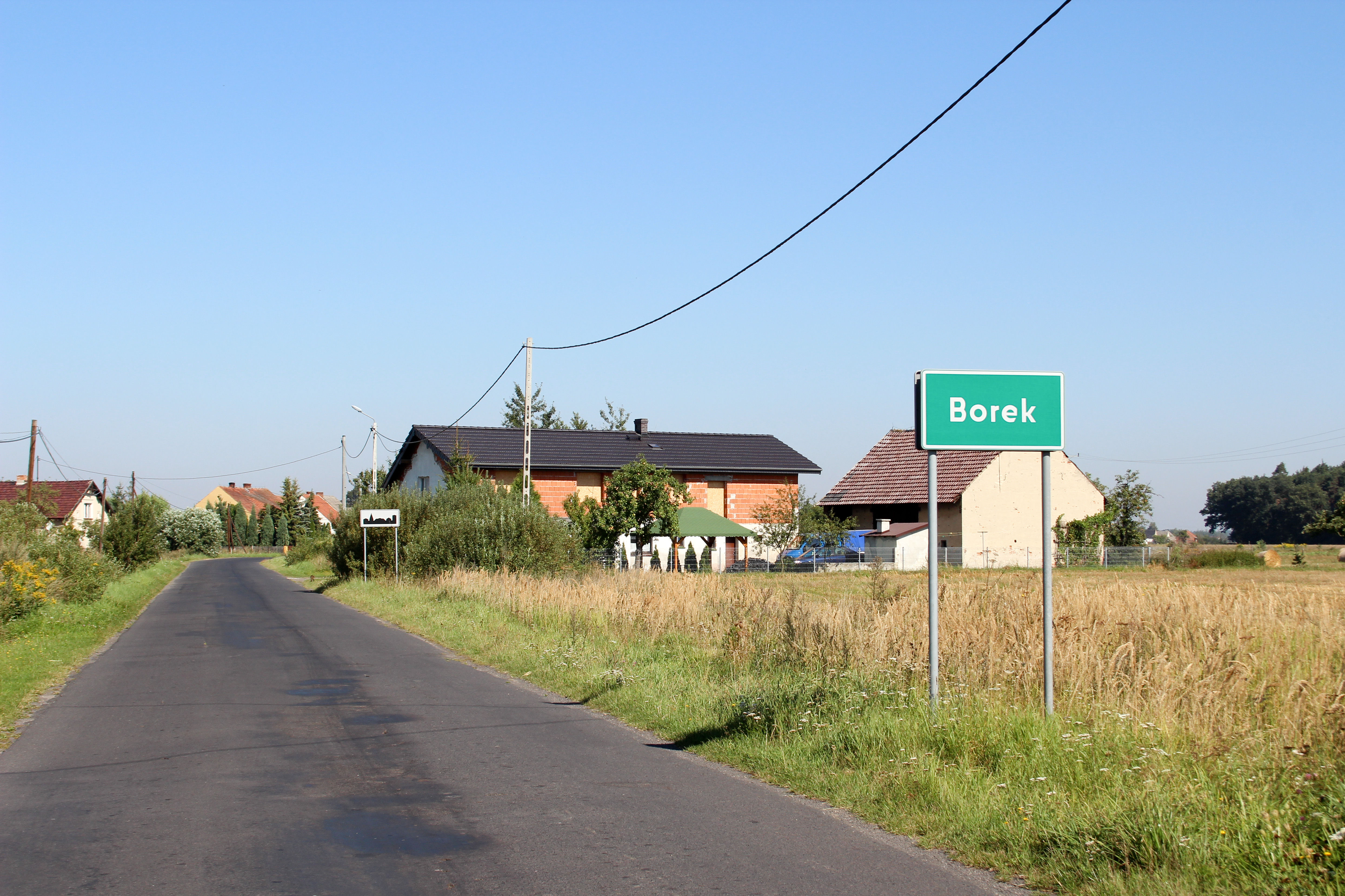 Borek - wieś w Polsce w województwie opolskim, w powiecie nyskim w gminie Korfantów.